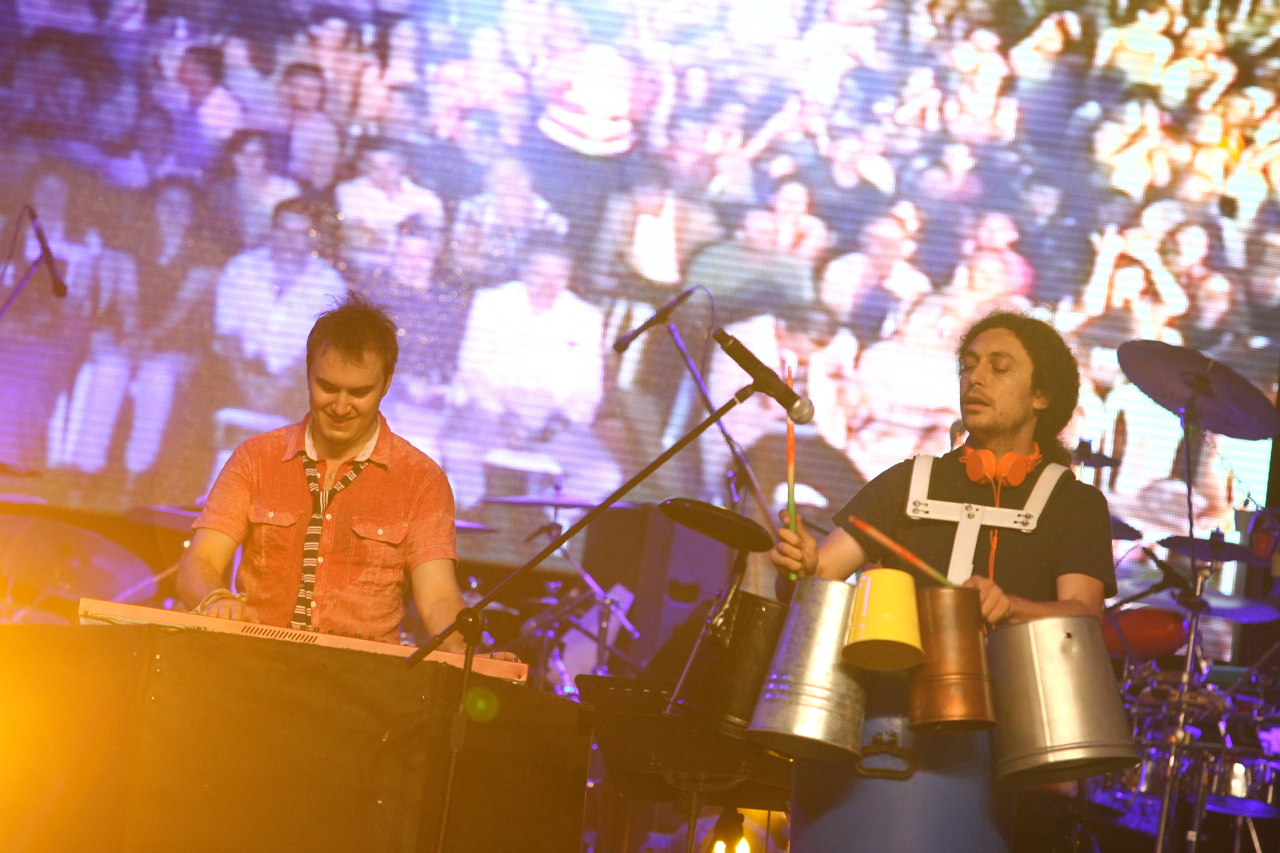 Mustafa Ceceli Bir Konserinde